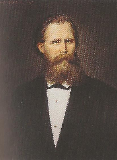 Porträt von Heinrich von Ferstel (1828–1883), Rektor der Technischen Hochschule Wien